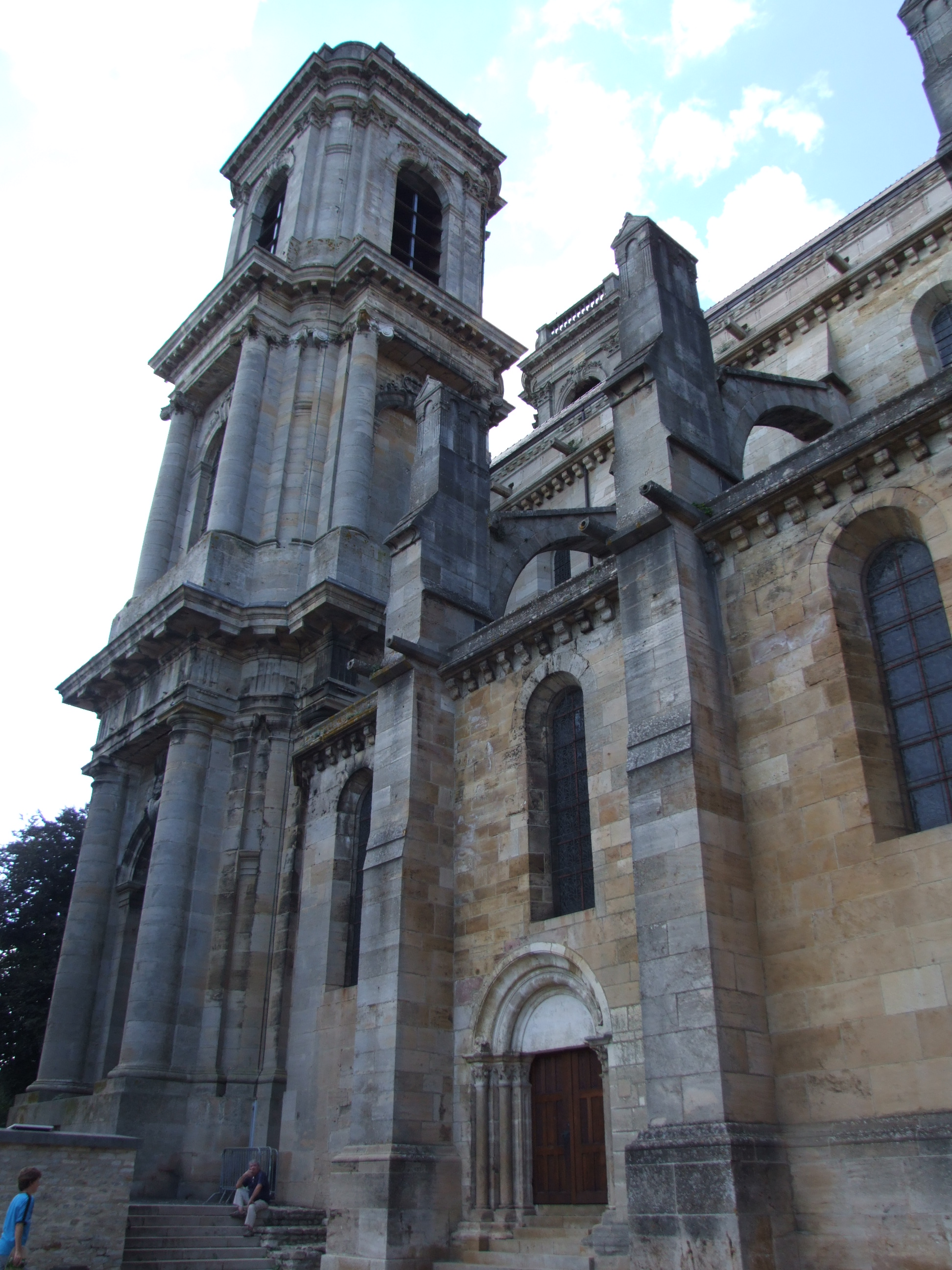 Cathédrale Saint-Mammès de Langres, FRANCE